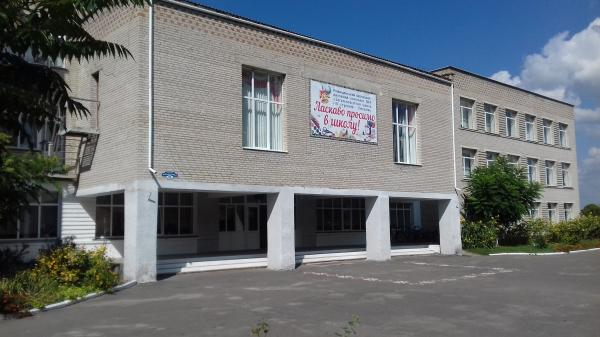 Будівля Рожищенського ліцею №4